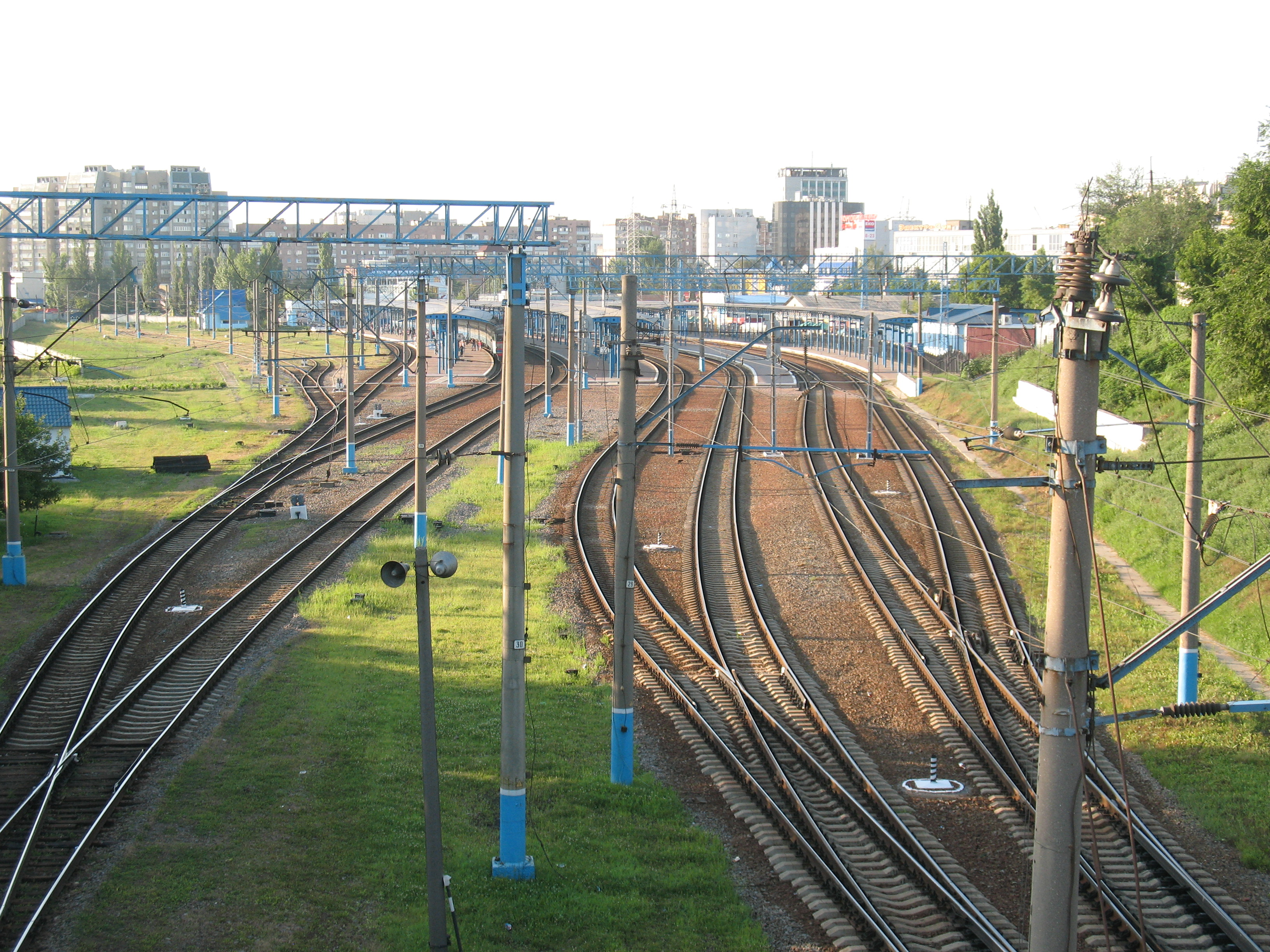 Вид станции Харьков-Левада после реконструкции. Пути с путепровода по ул. 1-й Конной Армии в сторону улицы Вернадского.